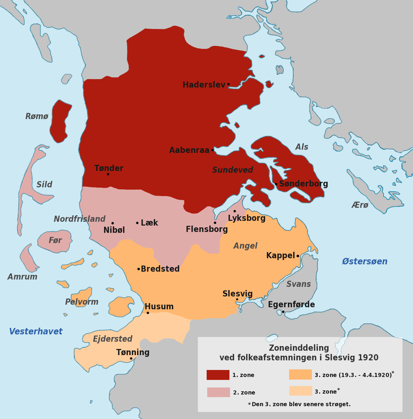 Zoneindelingen i Slesvig i 1920